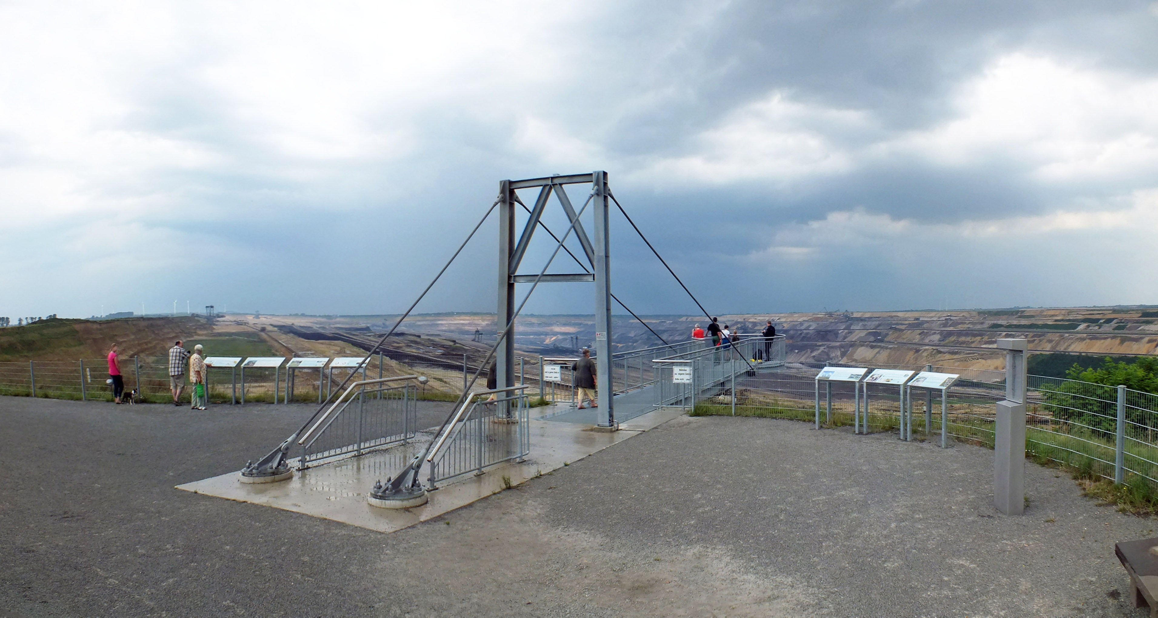 Skywalk bei Jackerath in Jüchen, Aussichtsplattform am Tagebau Garzweiler